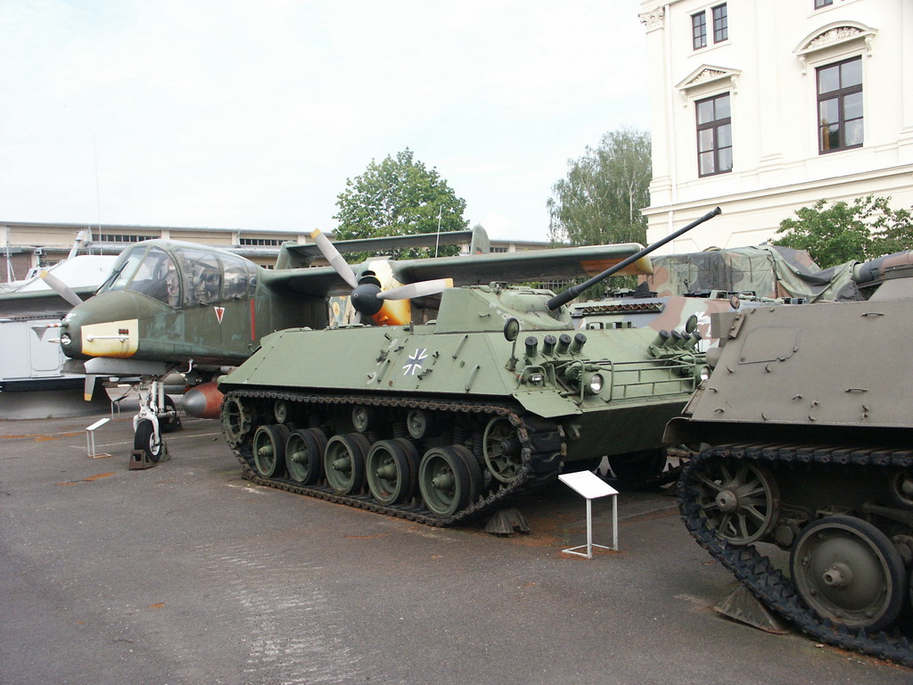 Bundeswehrmuseum Dresden mit Teilen von der NVA Remark: Rockwell OV-10 Bronco & Schützenpanzer lang (HS-30).